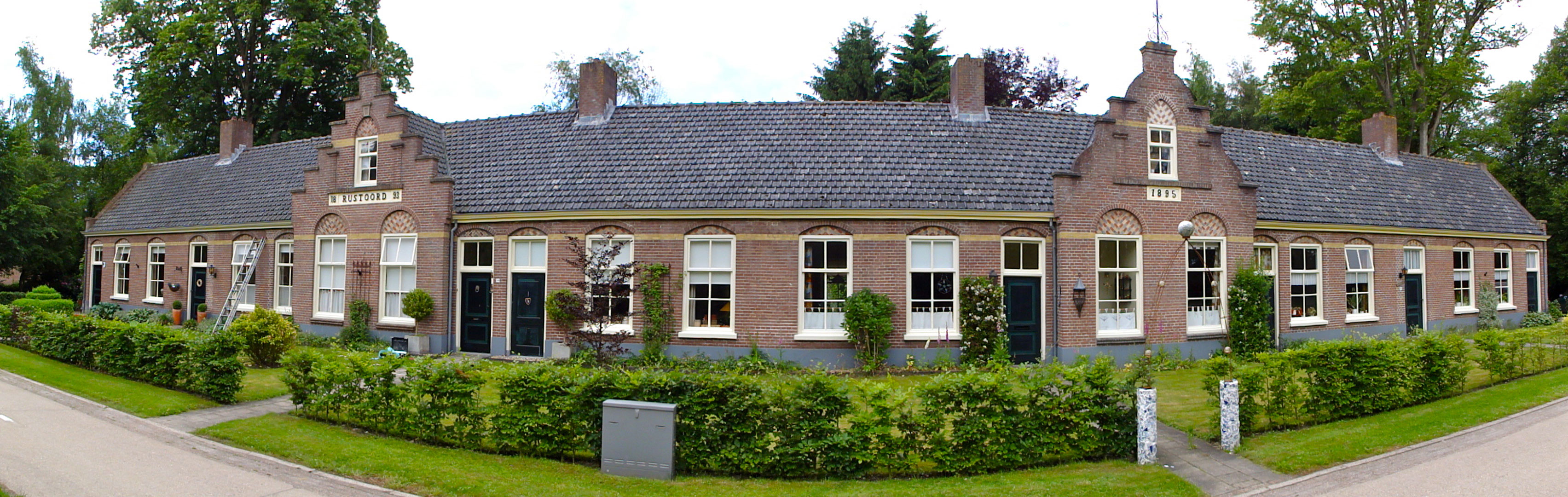 Rustoord I van de Maatschappij van Weldadigheid - Koningin Wilhelminalaan 30 t/m 44 - rijksmonument